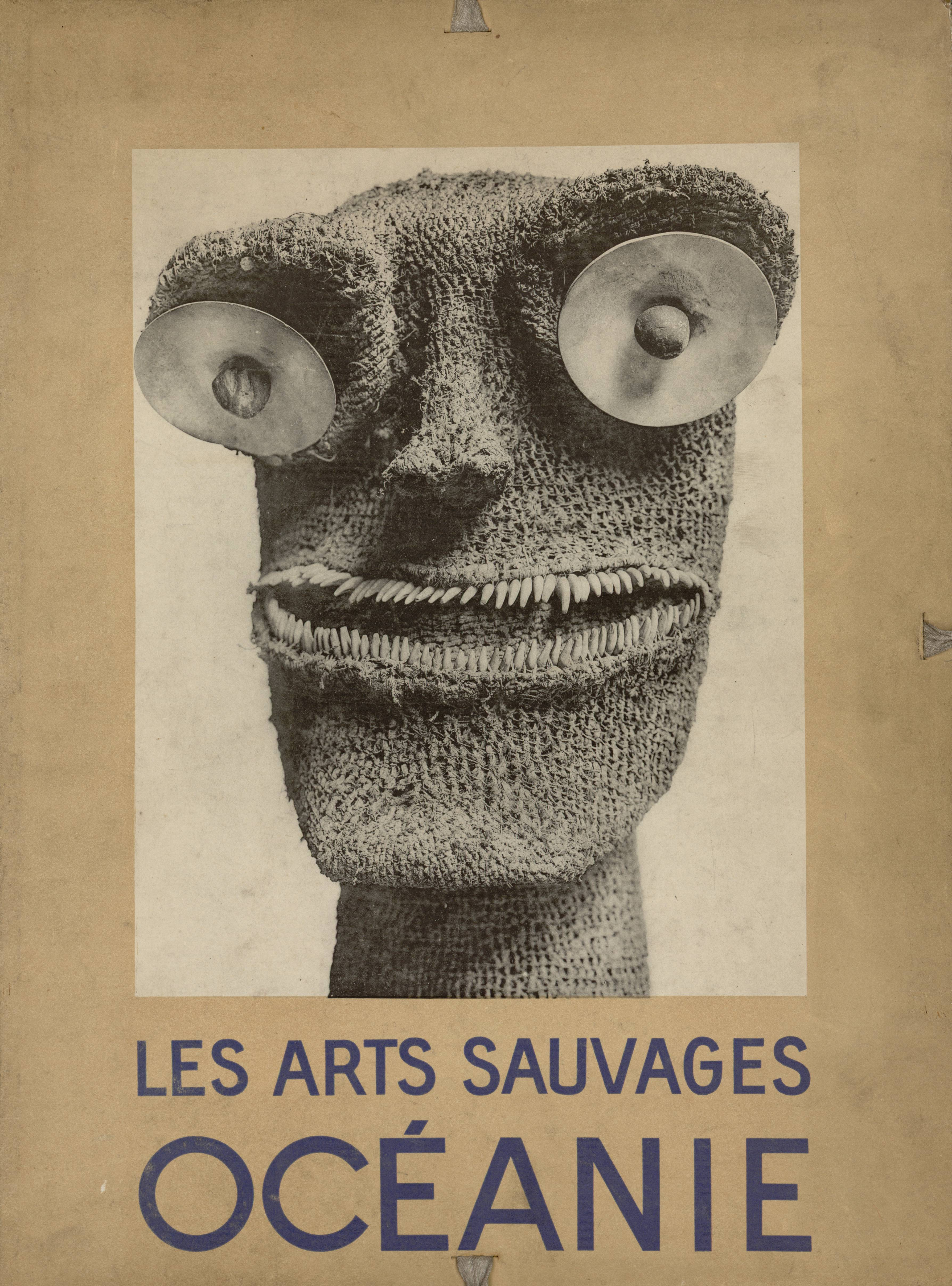 Coberta del llibre: Les arts sauvages : Océanie / [par] F[rançois] Poncetton et A[ndré] Portier.-- [Paris] : Éditions Albert Morancé, 1930, Paris, first printing